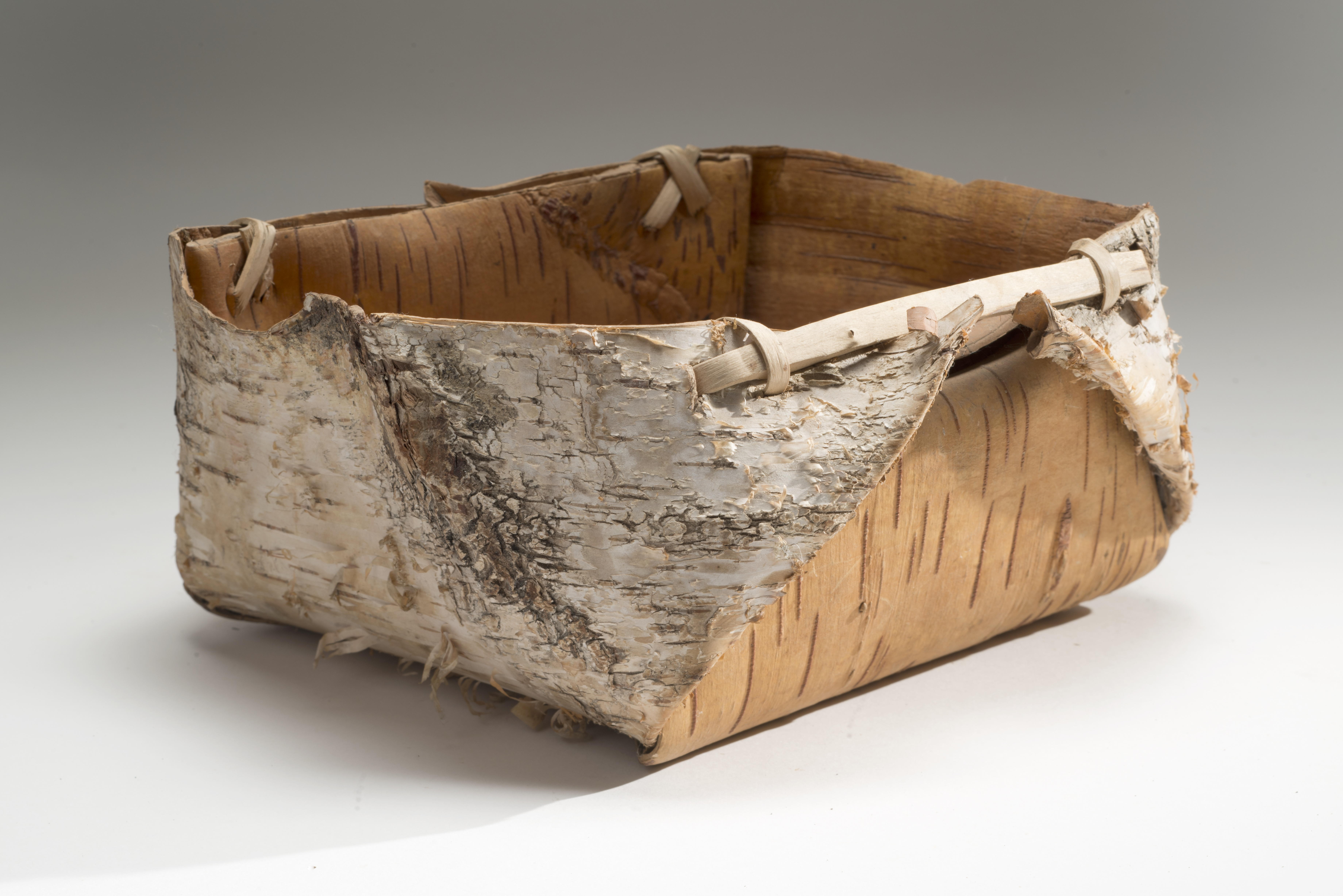 Tuohivakka; ropponen; rove; tuokkonen